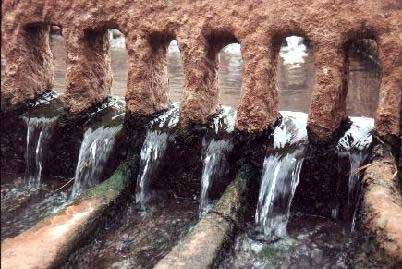 Les peignes (kesria) de répartition